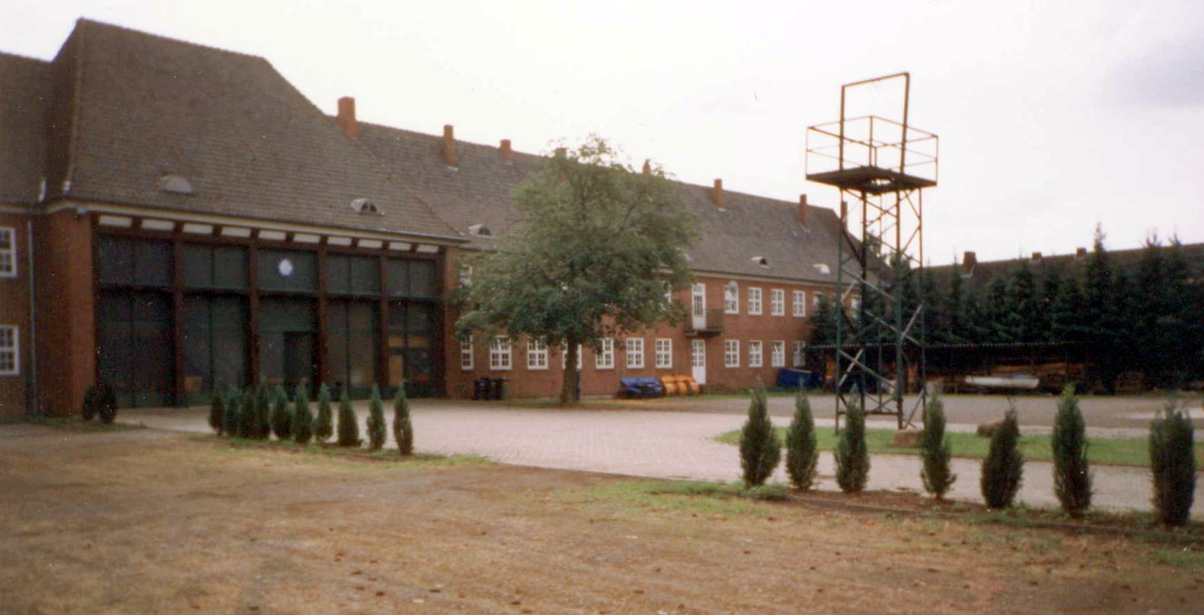 Quakenbrück Neustadt, ehemaliger Fliegerhorst, frühere Ehrenhalle, heute THW